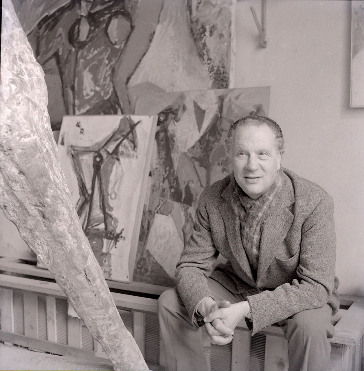 Servizio fotografico : Milano, 1963 / Paolo Monti. - Buste: 31, Fototipi: 31 : Negativo b/n, gelatina bromuro d'argento/ pellicola ; 6x6. - ((Serie costituita da 31 buste di negativi identificati con i nn.: 14303, 14304, 14305, 14306, 14307, 14308, 14309, 14310, 14311, 14312, 14313, 14314, 14315, 1431, 14317, 14318, 14319, 14320, 14321, 14322, 14323, 14324, 14325 (17), 14326 (18), 14327 (19), 14328 (20), 14329 (20A), 14330 (20B), 14331 (96), 14332 (97), 14333 (98), e tenute insieme da una graffetta. . - Sulla busta identificata con il n. 14303 iscrizione didascalica manoscritta a pennarello nero: "Marino/ Marini". - Occasione: Documentazione dello studio di Marino Marini e ritratti dell'artista